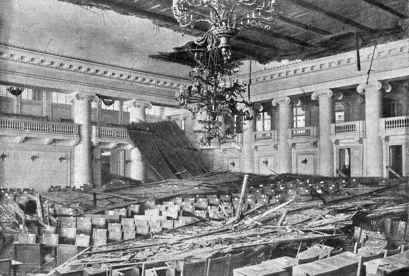 Обвал потолка в Государственной Думе Российской империи. Вид зала заседаний с частями обрушившегося потолка.